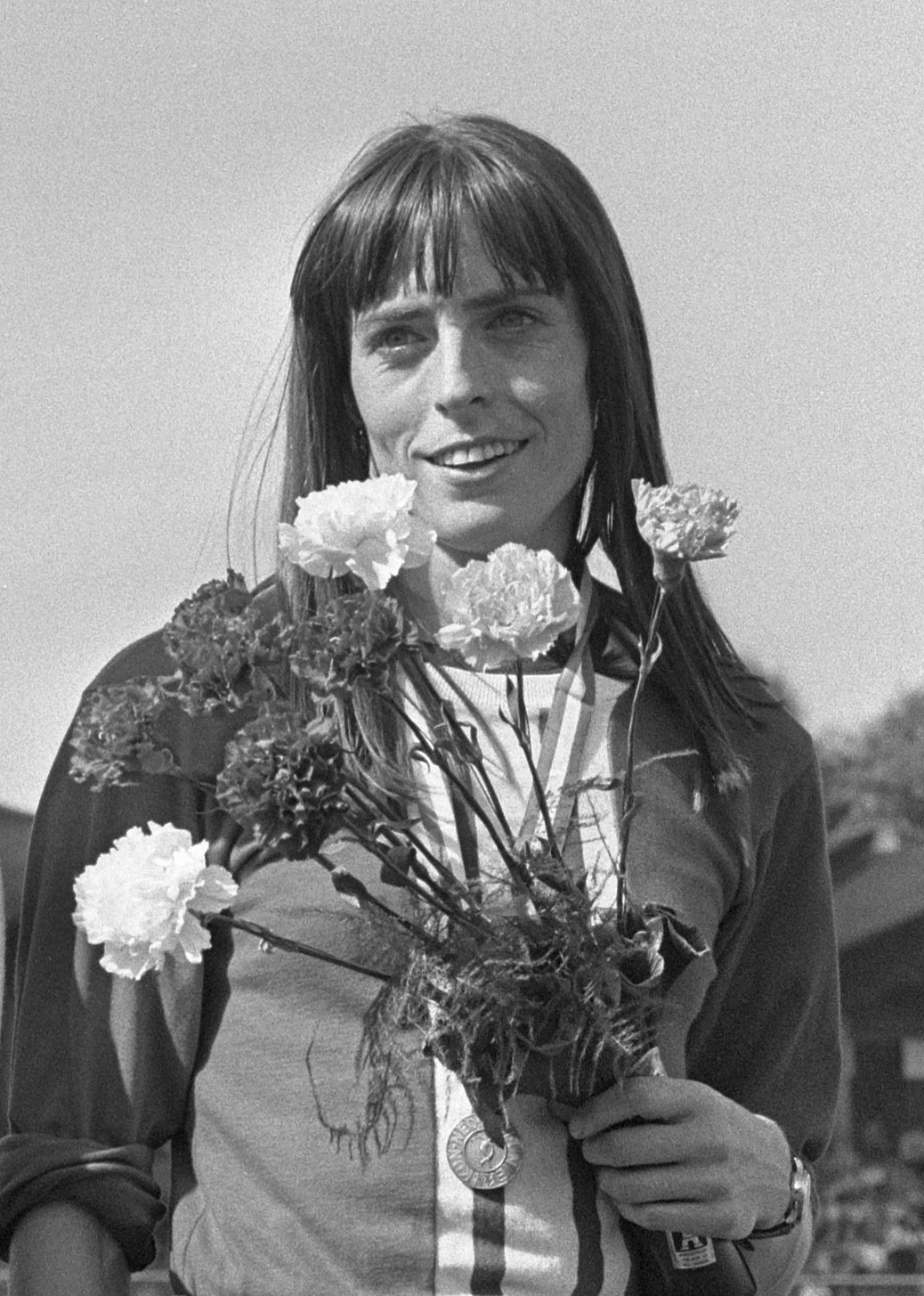 Nationale Atletiekkampioenschappen te Kerkrade, Berny Boxem-Lenferink